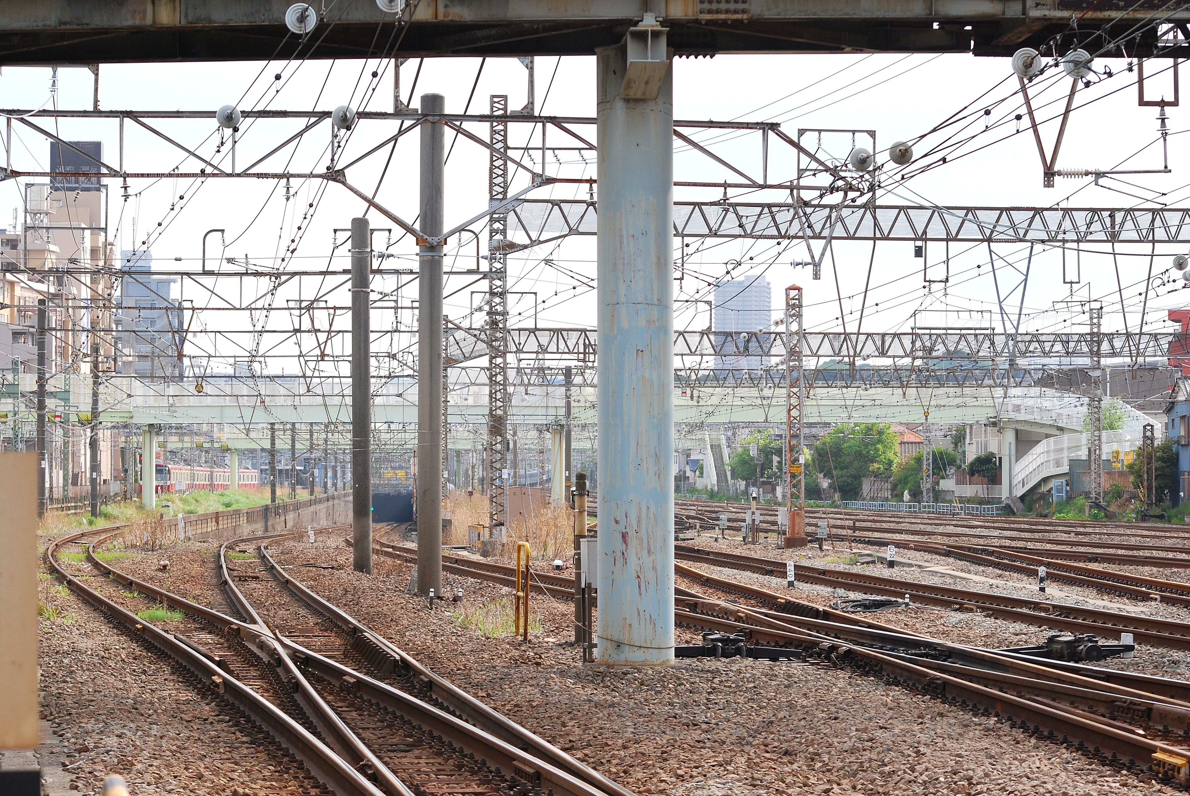 東海道貨物線と高島線との分岐点、京浜急行本線月花園駅付近で左側の地下のトンネルに続く路線は東海道貨物線、そのまま地上で続く路線は高島線。（公道から撮影）